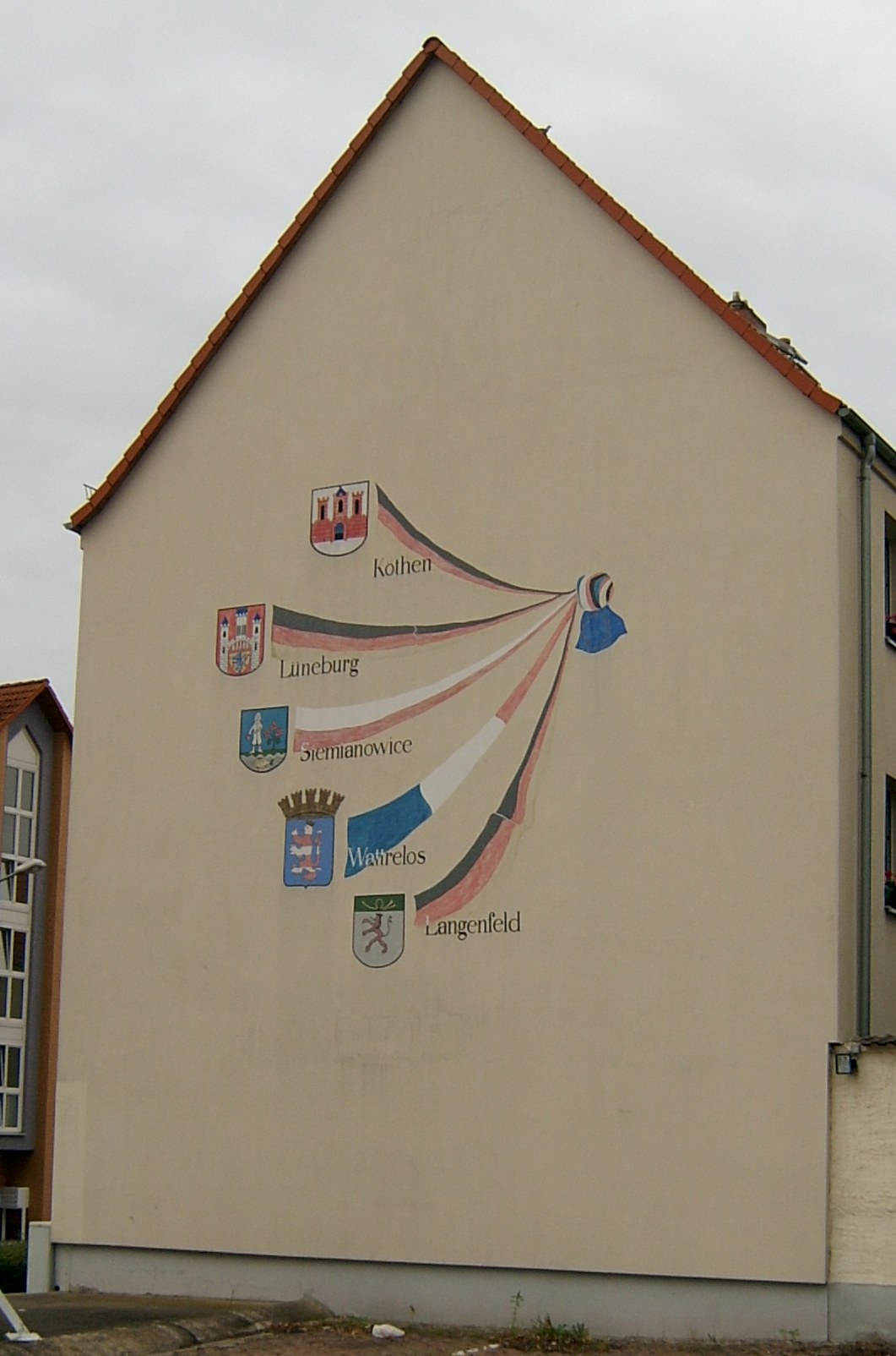 Haus in der August-Bebel-Straße, in Köthen (Anhalt). Als Wandbild die Städtepartnerschaften Köthens.